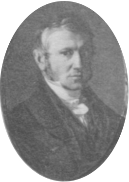 Porträt von August Friedrich von Köstlin.